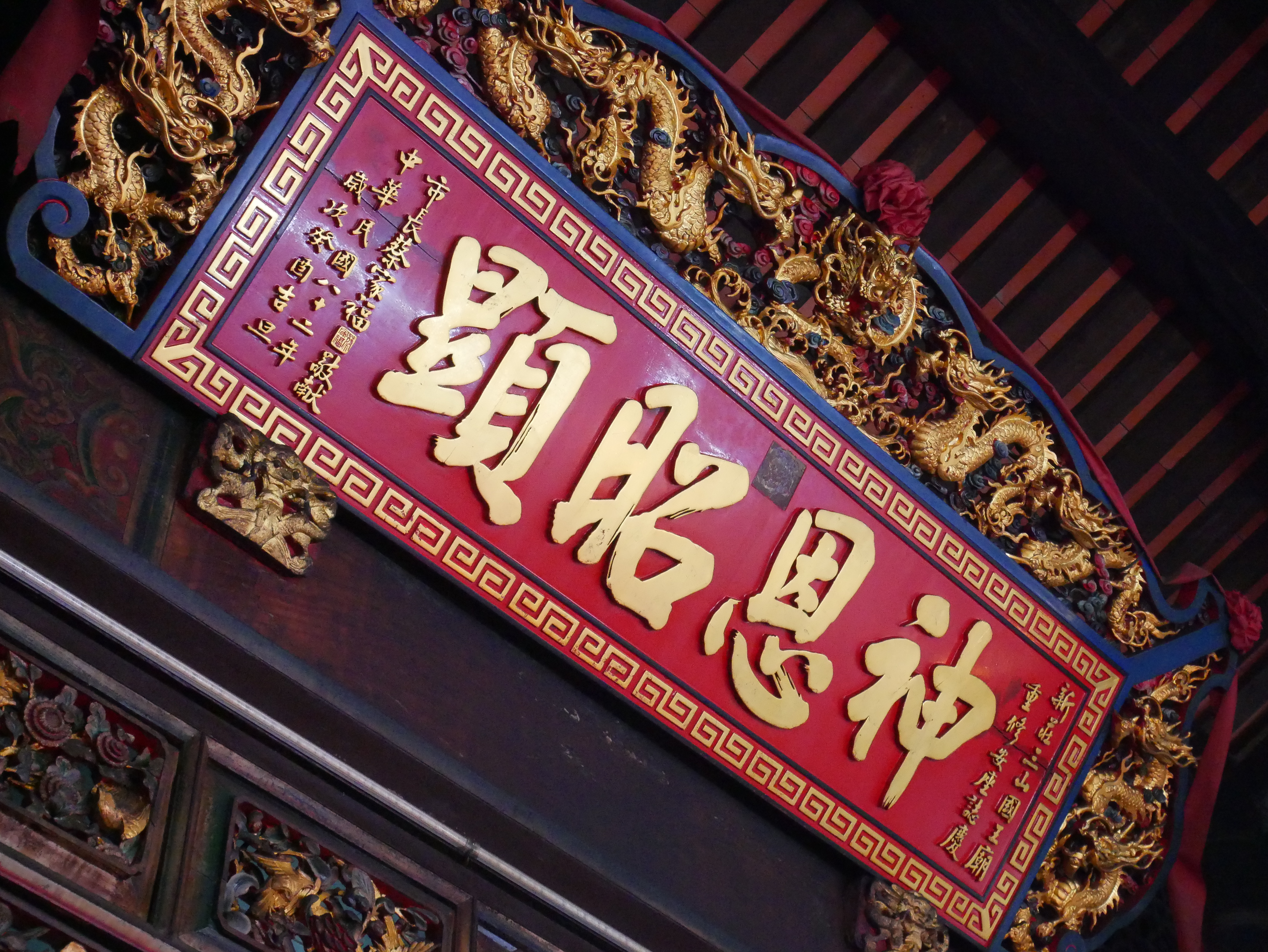 中文（台灣）: 新莊廣福宮「神恩昭顯」匾，中華民國82年臺北縣新莊市市長蔡家福敬獻。